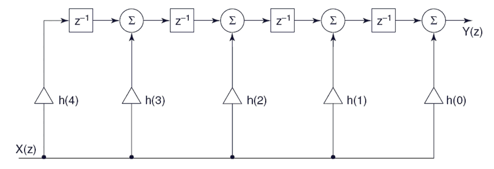 FIR Filterstruktur, kanonische Normalform 2, (Direct Form 2, DF2)